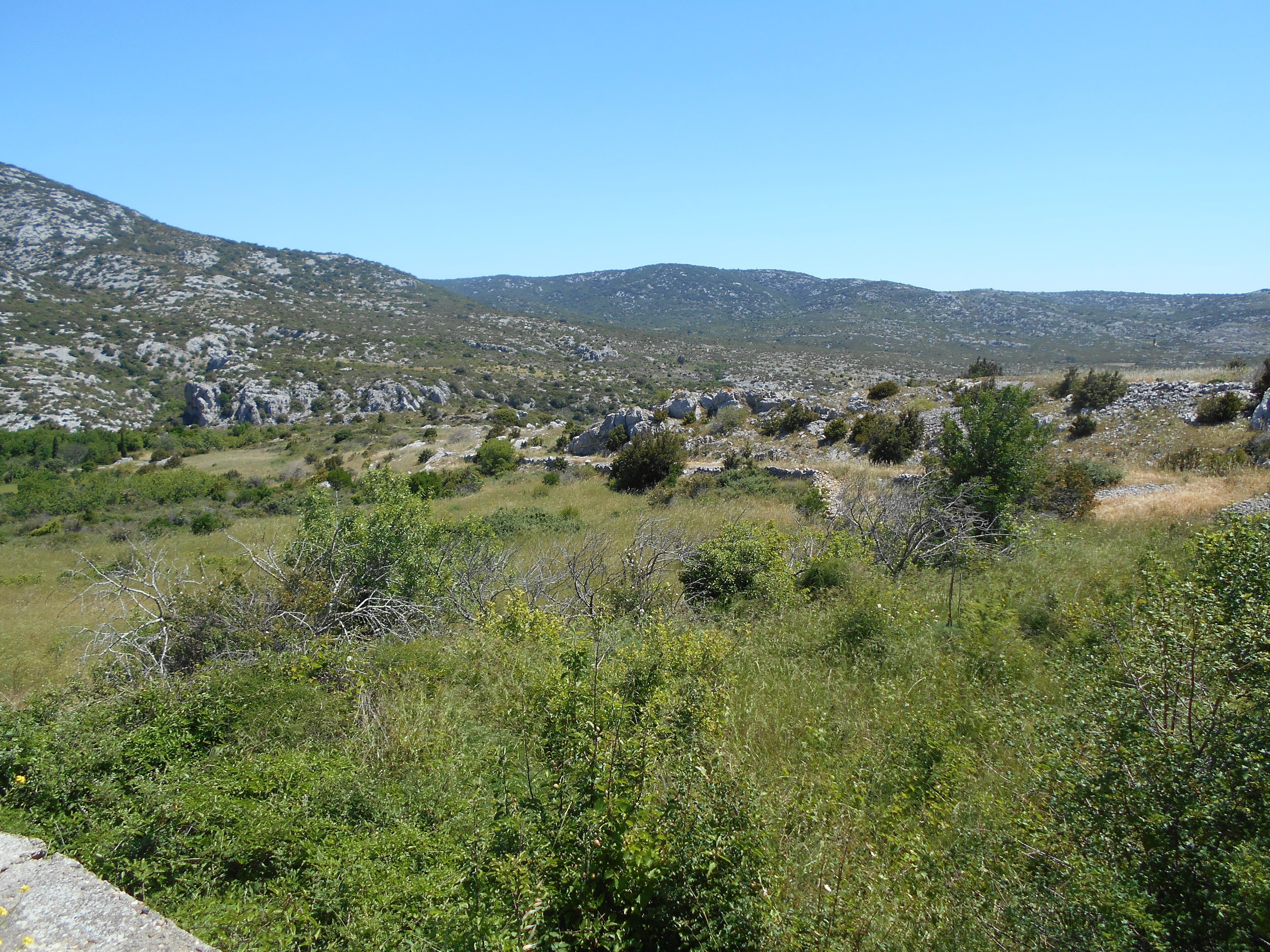 La vall de Peerellós